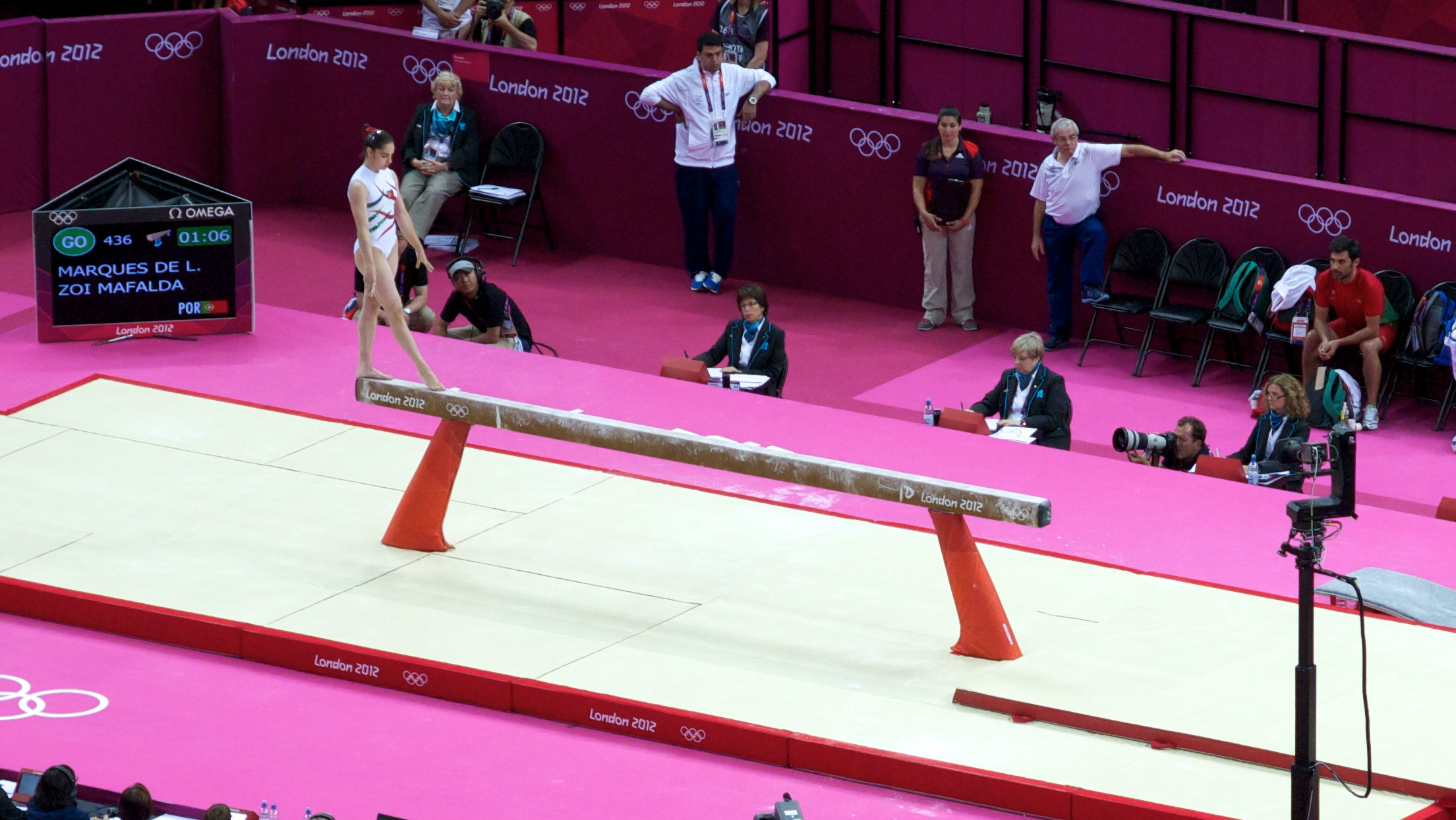 Zoi Mafalda Marques de Lima, Portugal